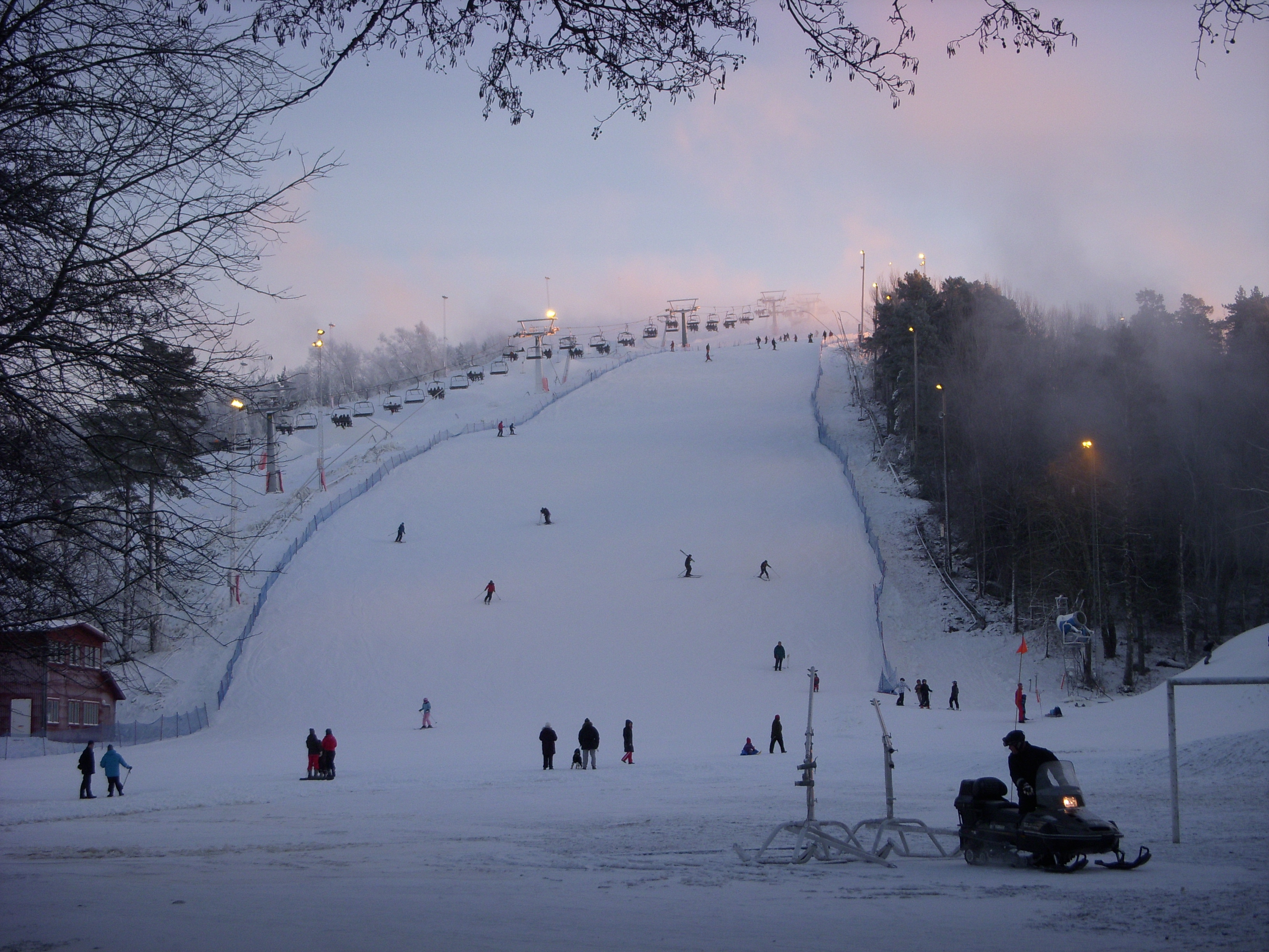 Skidbacken "Flottsbro alpin" i Huddinge